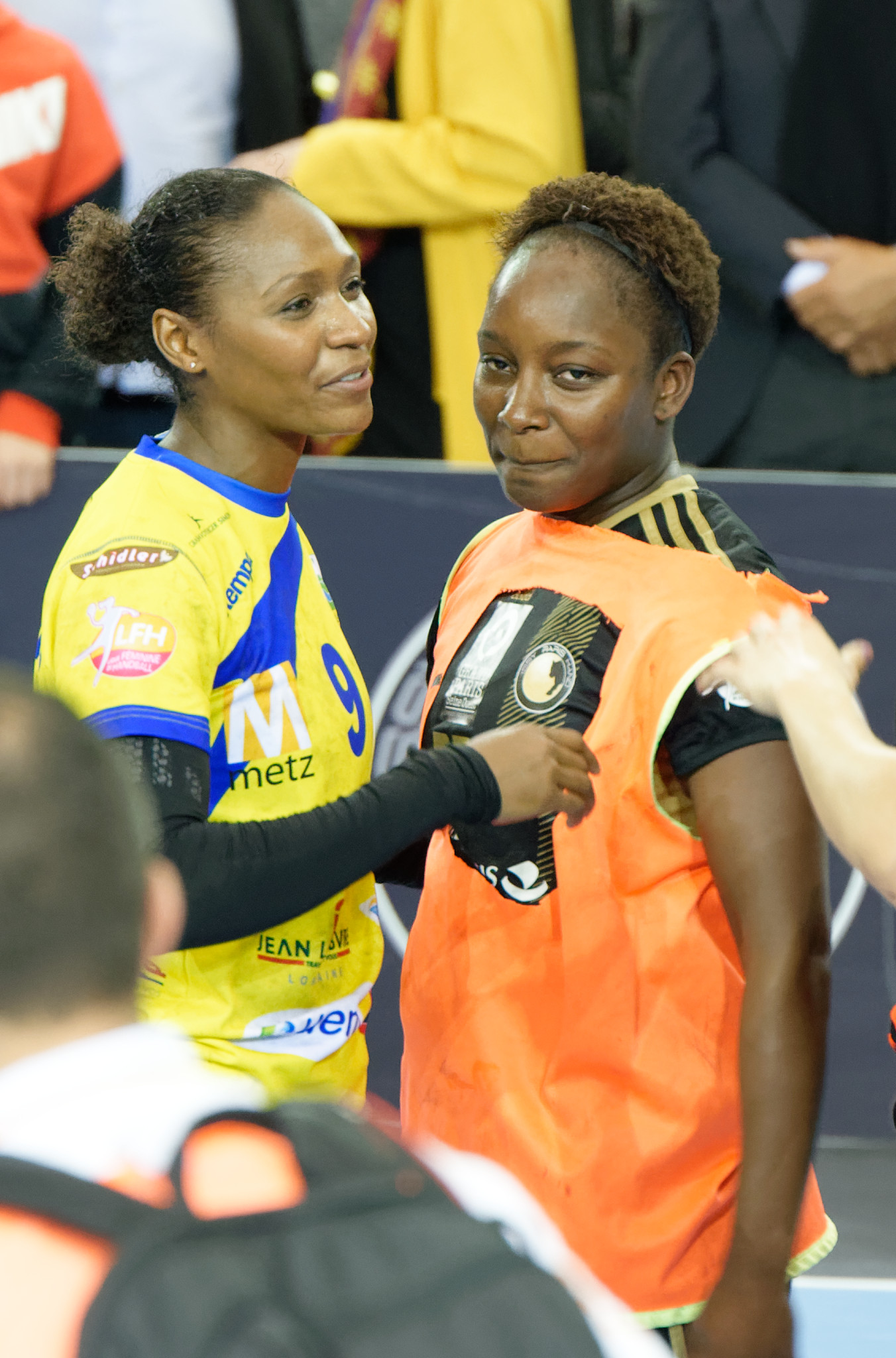 Doungou Camara porte la chasuble avec laquelle elle a inscrit le but qui a qualifié Issy Paris Hand lors de la demie-finale retour du championnat de France 2014-15 contre Metz. Le 20 mai 2015 à Issy Les Moulineaux